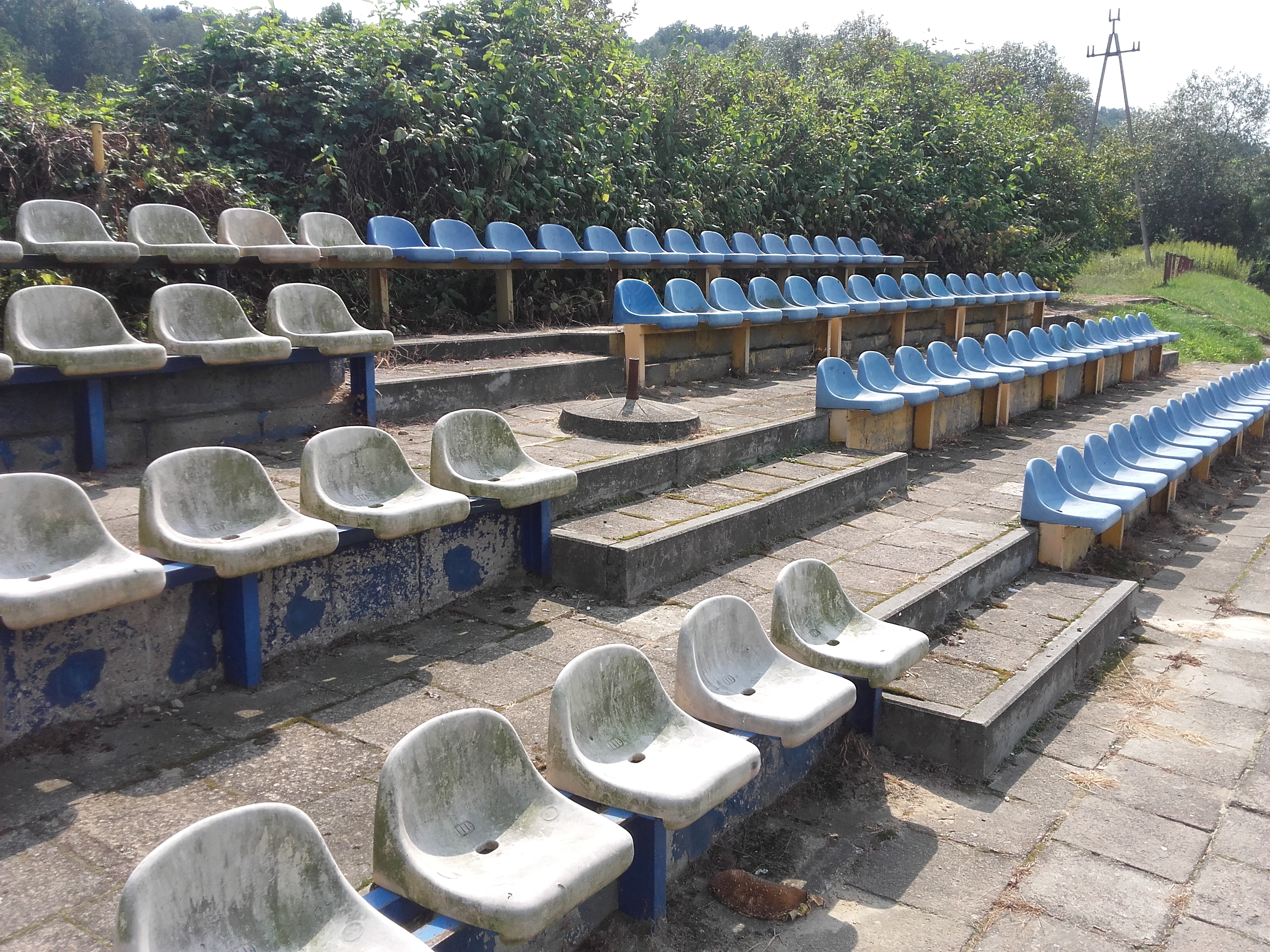 Trybuna główna stadionu klubu Orły w Bochotnicy.